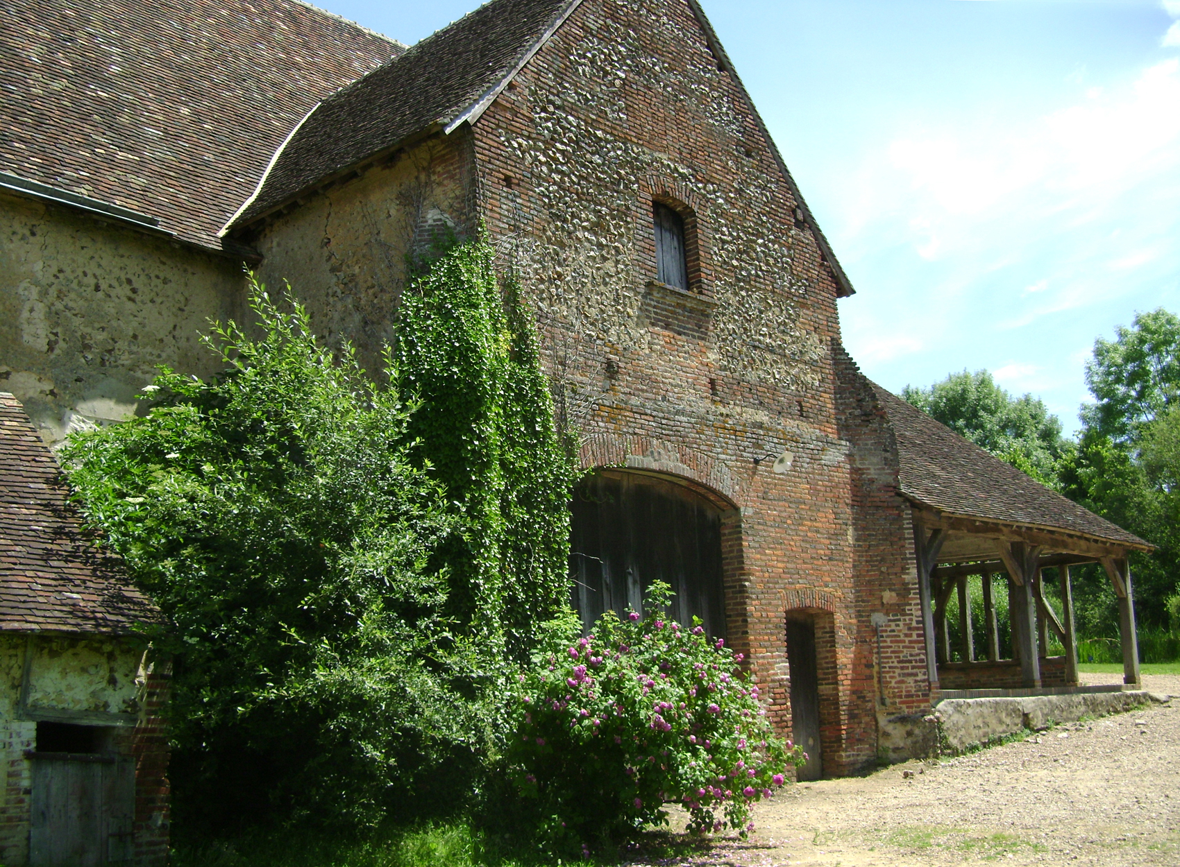 Grange permettant à l'ordre des Hospitaliers d'entreposer le produit de la dîme récoltée chaque année.